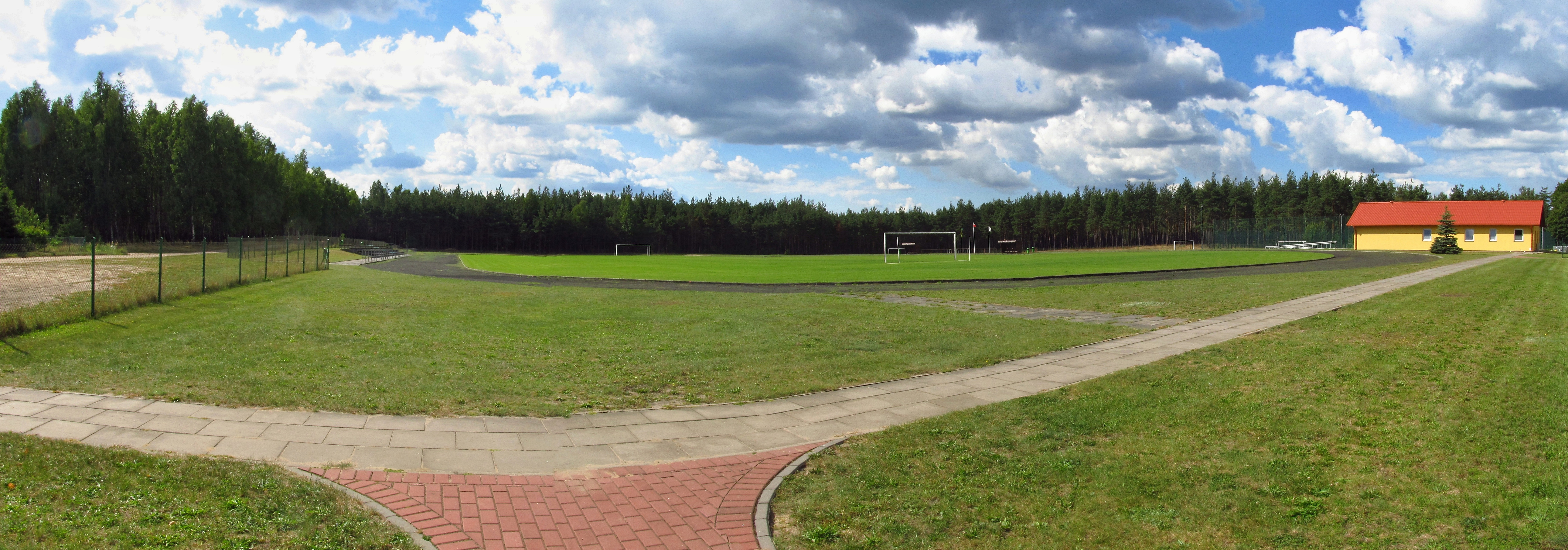 Boisko sportowe Victorii Kaliska należy do klubu o tej samej nazwie, powstałego w roku 1953.